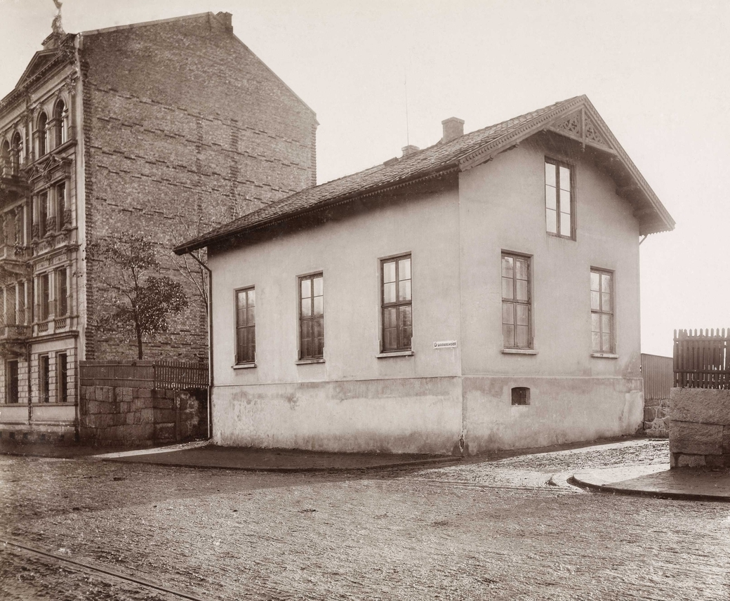 Portnerboligen til Østre Terningbekken, Drammensveien 68. Ukjent fotograf, ca. 1898. Huset ble revet 27. oktober 1898, og i dens sted er nå en bygård tegnet av Alfred Køhn. Fra Byhistorisk samling hos Oslo Museum.